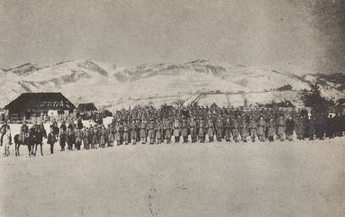 II batalion 2 pułku piechoty Legionów Polskich w Masie